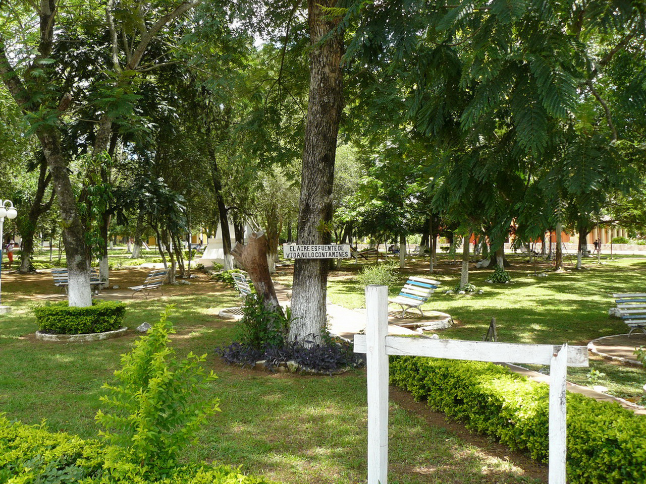 Fotos de los refugios y reservas de Itaipu, tomadas en los años 2007 y 2008 por mí